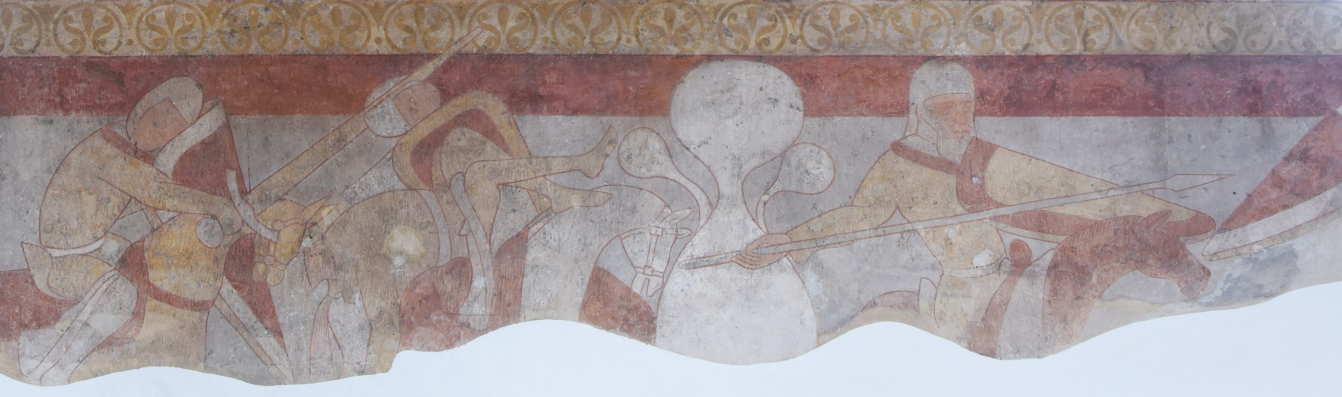 Aal Kirche Reiterkampfszene